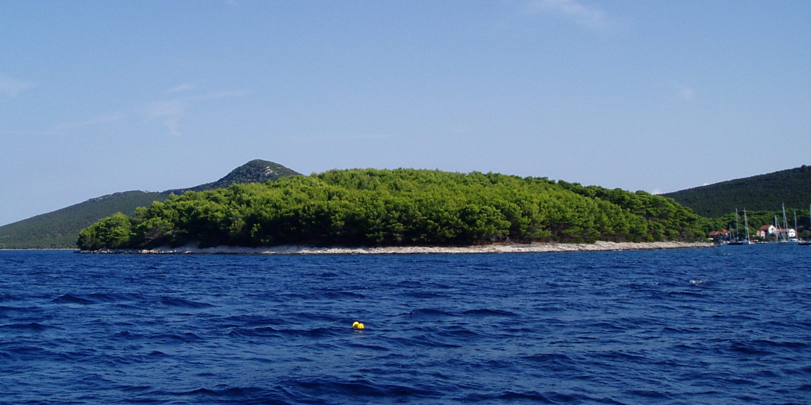 Brgulje island in Brgulje bay